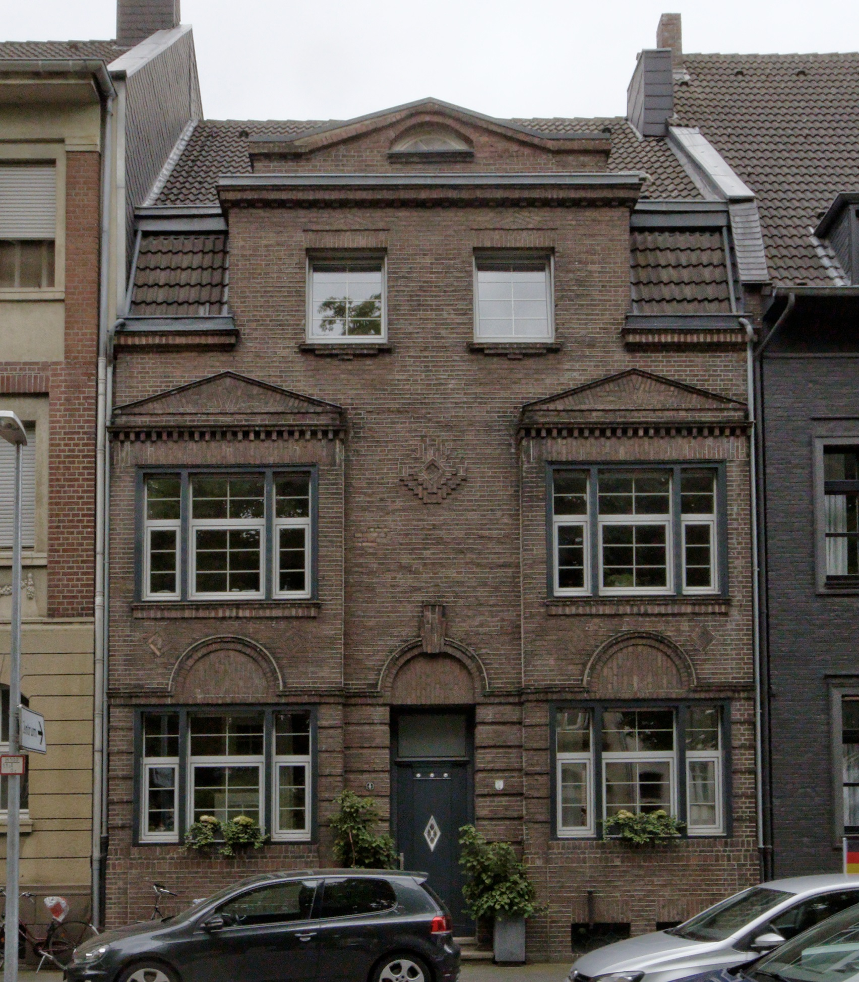 Krefeld, Hohenzollernstr. 4; Architekt: August Biebricher